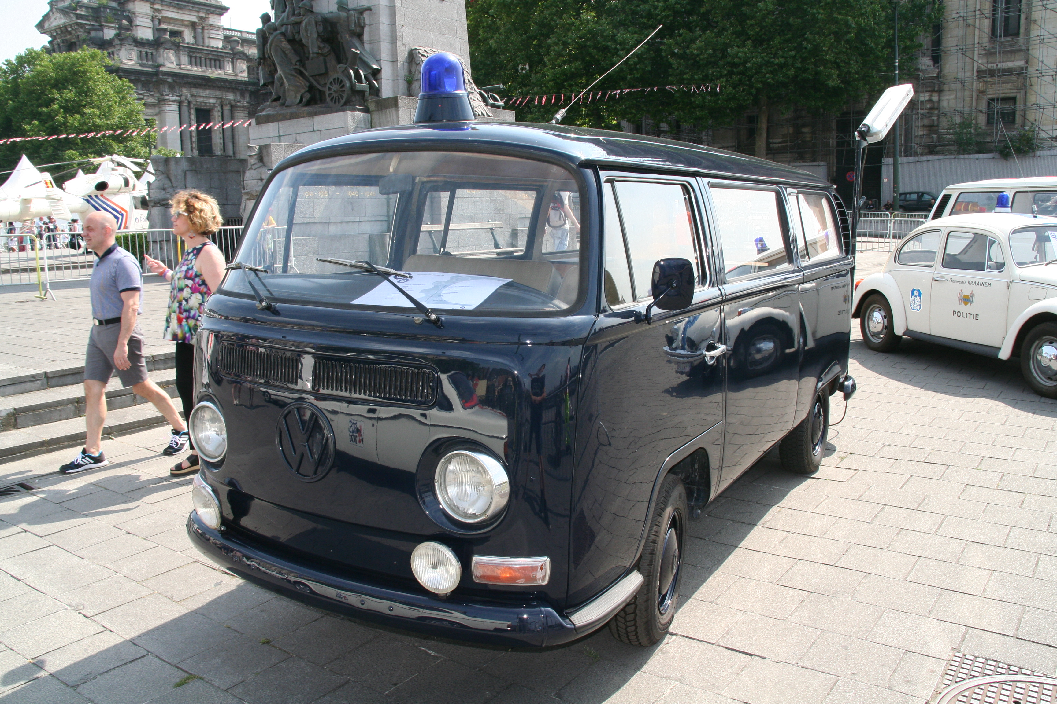 Fête nationale belge à Bruxelles le 21 juillet 2016 - VW Combi de la Gendarmerie belge